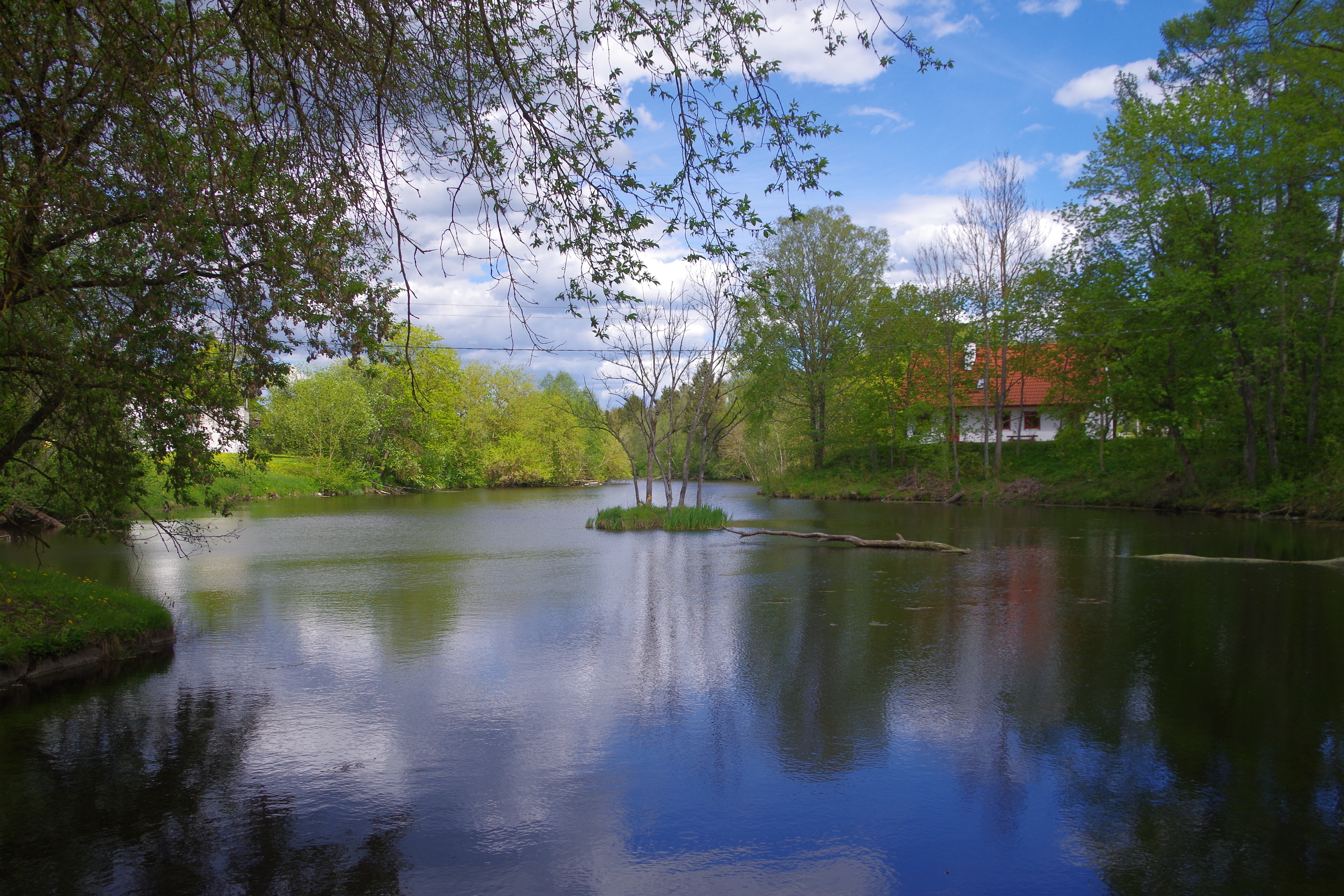 Kurtna paisjärv asub Harjumaal, Saku vallas, Kurtna külas.Järve läbib Koosi oja